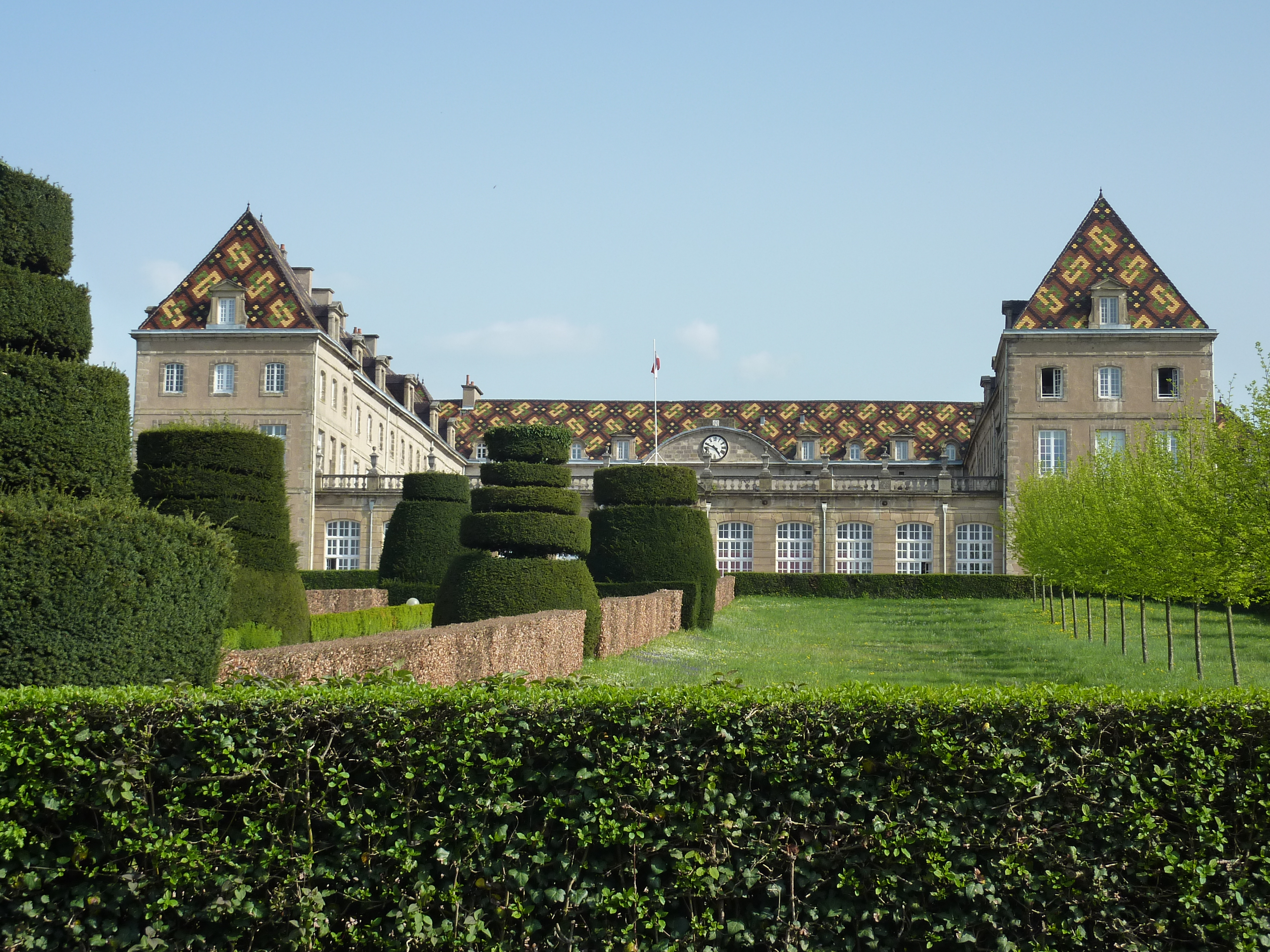 Autun : l'école militaire préparatoire, dite école des "Enfants de troupe" (XVIIe siècle)